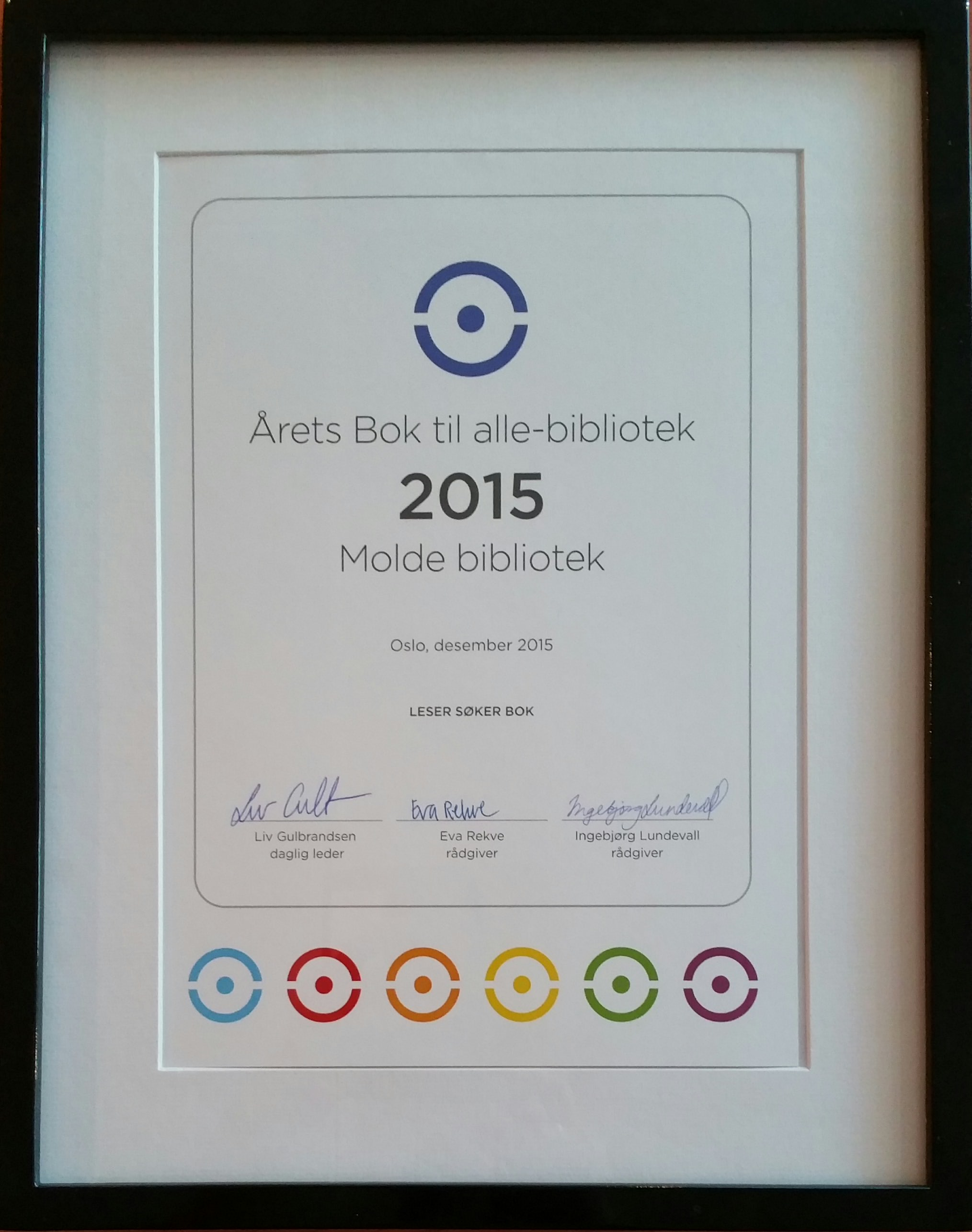 30. november 2015 ble Molde bibliotek kåret til årets «Bok til alle» - bibliotek 2015 av «Leser søker bok».